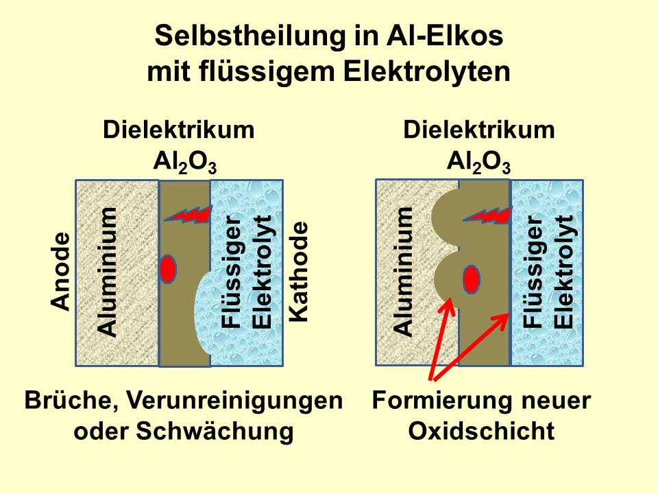 Selbstheilungsmechanismus bei Al-Elektrolytkondensatoren mit flüssigem Elektrolyten